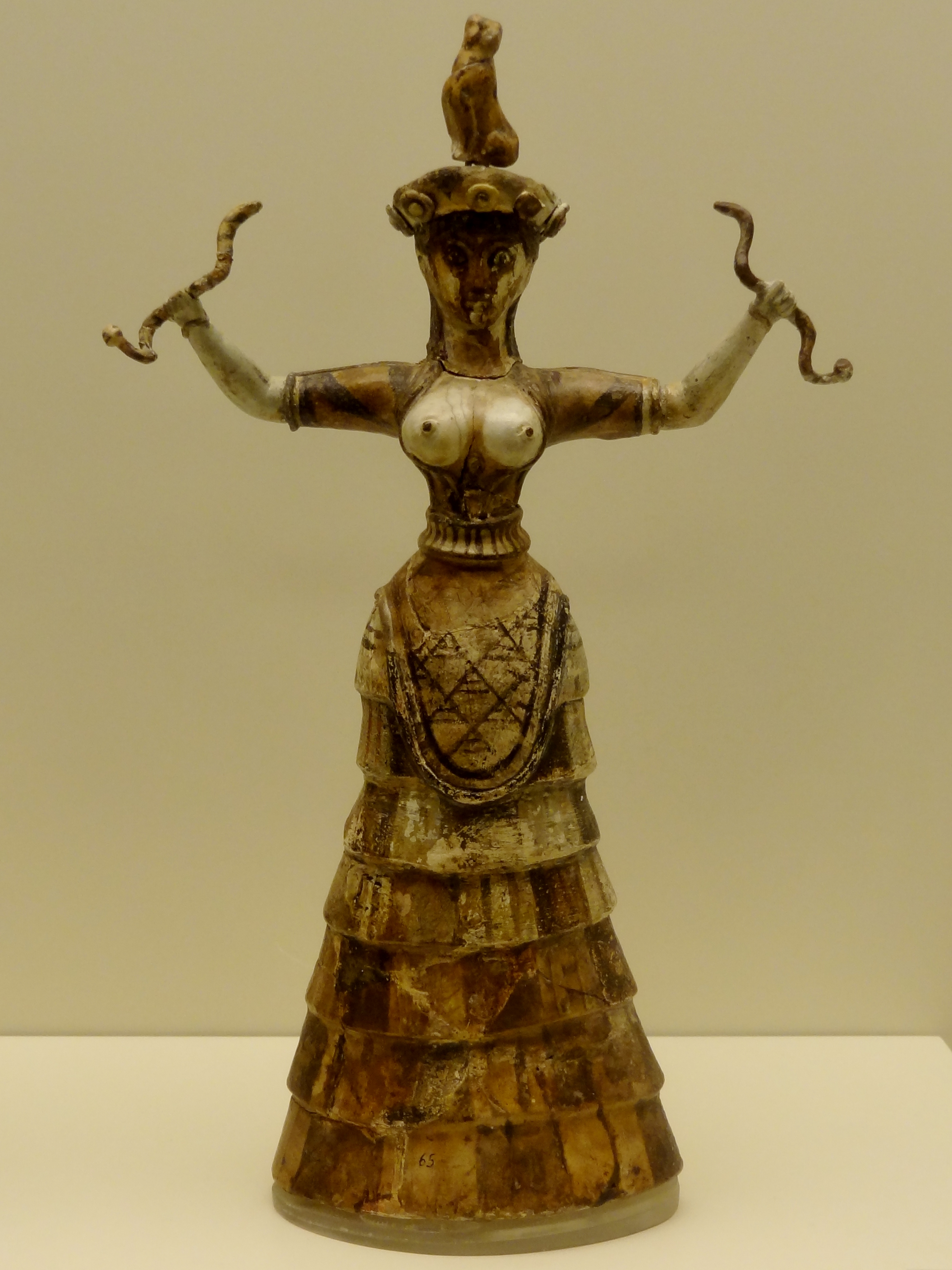 Fayencestatuette der „kleinen Schlangengöttin“ (Neupalastzeit um 1600 v. Chr.) aus dem Palast von Knossos, ausgestellt im Archäologischen Museum Iraklio, Kreta, Griechenland